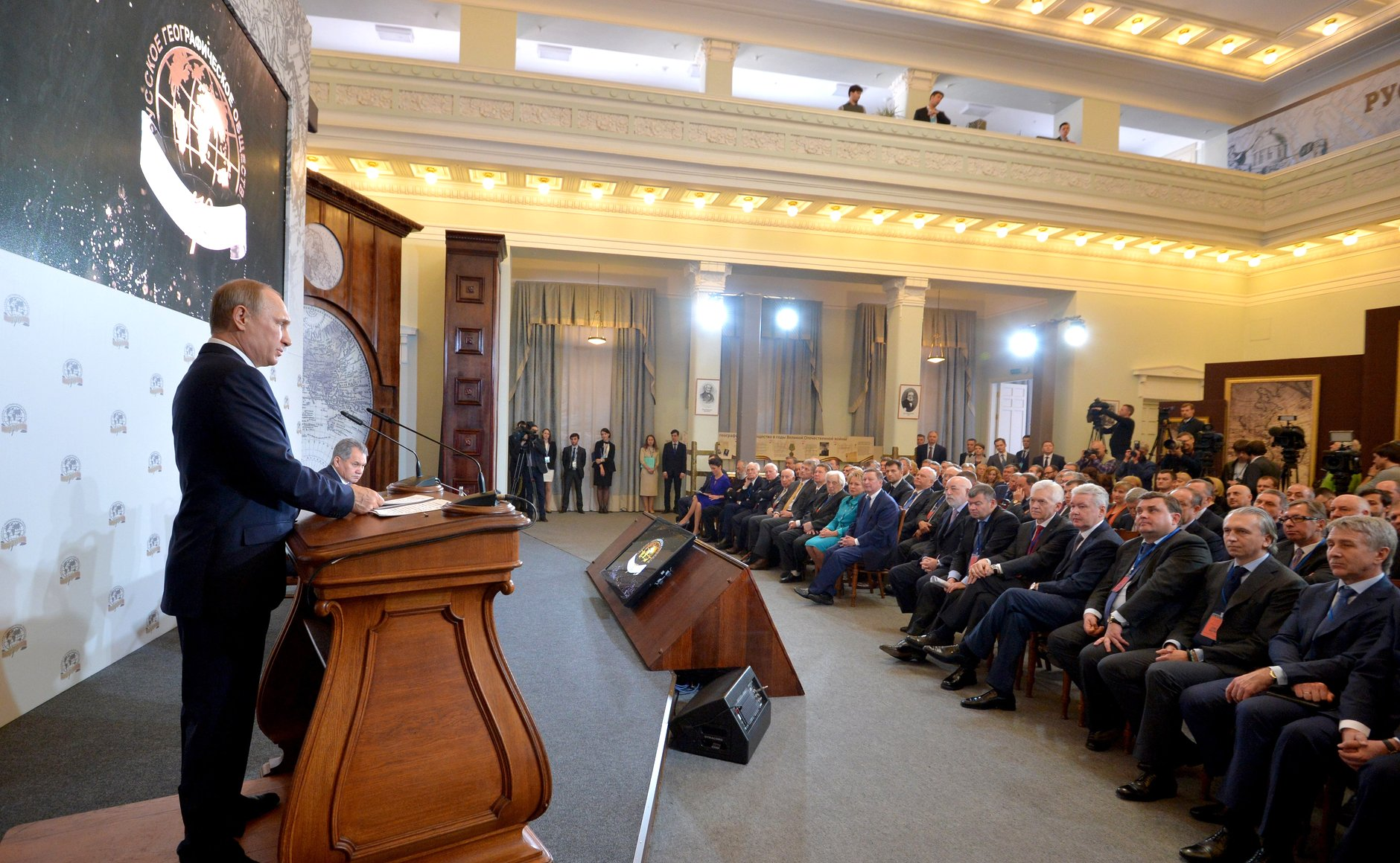 Заседание попечительского совета Русского географического общества